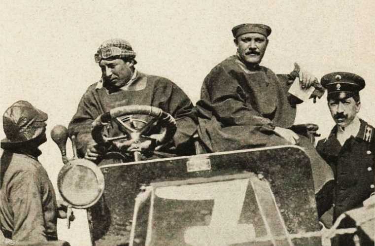 René Champoiseau sur C.G.V. 30 hp deuxième du premier Saint-Pétersbourg-Moscou en 1907 (derrière A. Duray sur Lorraine-Dietrich 60 hp) - La Vie au Grand Air - 22 juin 1907, p.429 (ou Course des "Voitures françaises")